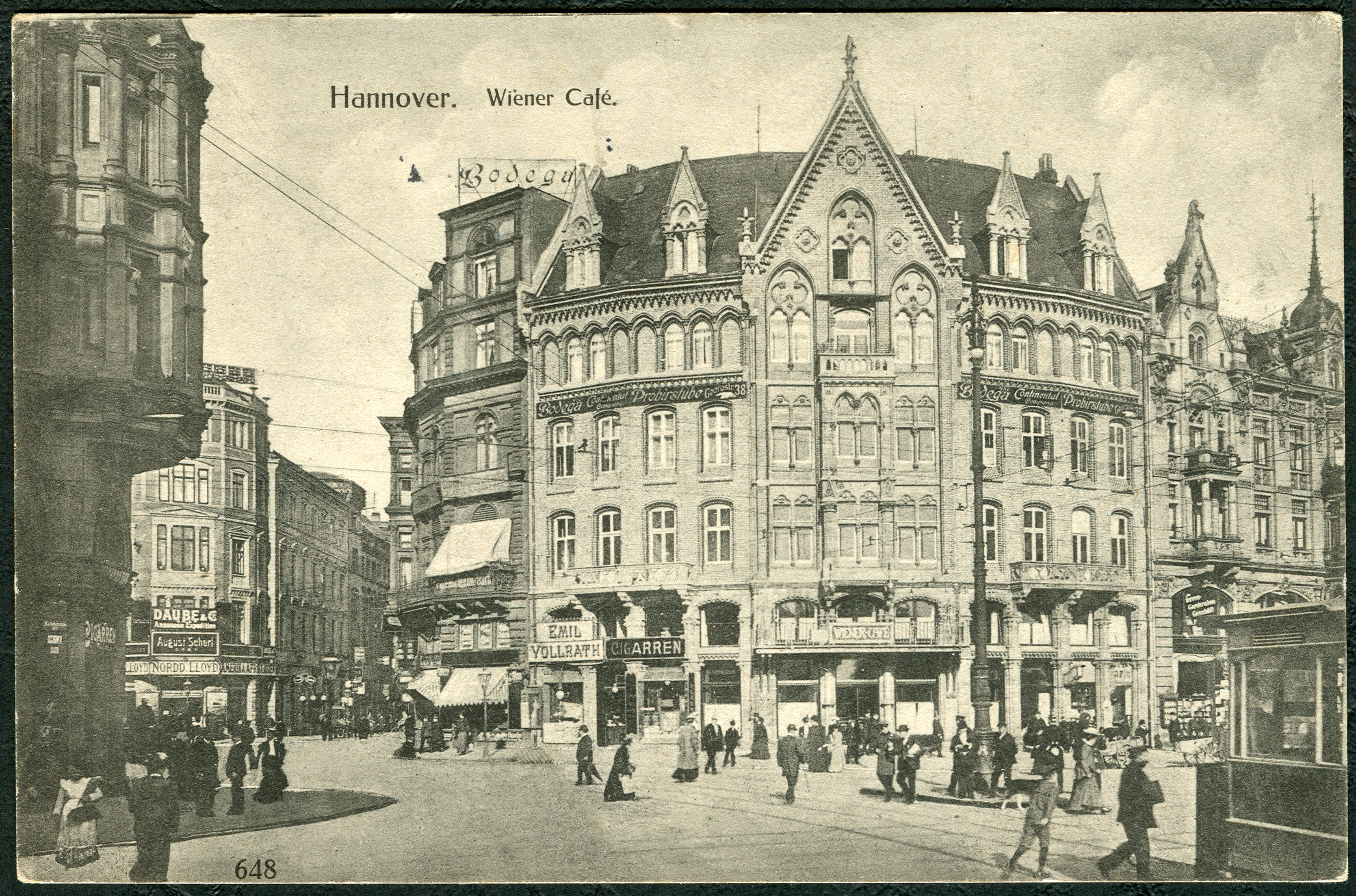 Ansichtskarte mit der Nummer 648 eines anonymen Fotografen (siehe Rückseite der Karte); zu sehen ist eine belebte Szene am (heute so genannten) Kröpke mit Blick auf das Wiener Café im Haus Heinemann, 1863 von Edwin Oppler für den Bankier Heinemann errichtet als eines der ersten Gebäude am Platz. Das Haus unter der (seinerzeitigen) Adresse Georgstraße 28/Ecke Bahnhofstraße wurde um 1900 von der Bodega Continental Companie, die auch auf dem Dach des Nachbargebäudes an der Ecke Große Packhofstraße ihre Firmenwerbung platzierte, für ihre "Probirstube" genutzt. Im Erdgeschoss hatte der Großschlachter Emil Vollrath eine Filiale. Beide Eckgebäude wurden durch die Luftangriffen auf Hannover im Zweiten Weltkrieg zerstört und dann durch das heute denkmalgeschützte Kaufhaus Magis ersetzt. In dem Eckgebäude links im Hintergrund waren Daube & Co. mit ihrer American Expedition untergebracht sowie die August Scherl GmbH. Dort vertrieb auch der Norddeutsche Lloyd seine Reisen per Dampfschifffahrt nach Amerika, Afrika und Asien.